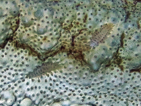 Deux vers polychètes de la famille des Polynoidae (probablement Gastrolepidia clavigera), présents sur la peau d'une holothurie Thelenota anax, comme parasites ou symbiotes, aux Maldives (Landaagiraavaru, atoll de Baa).